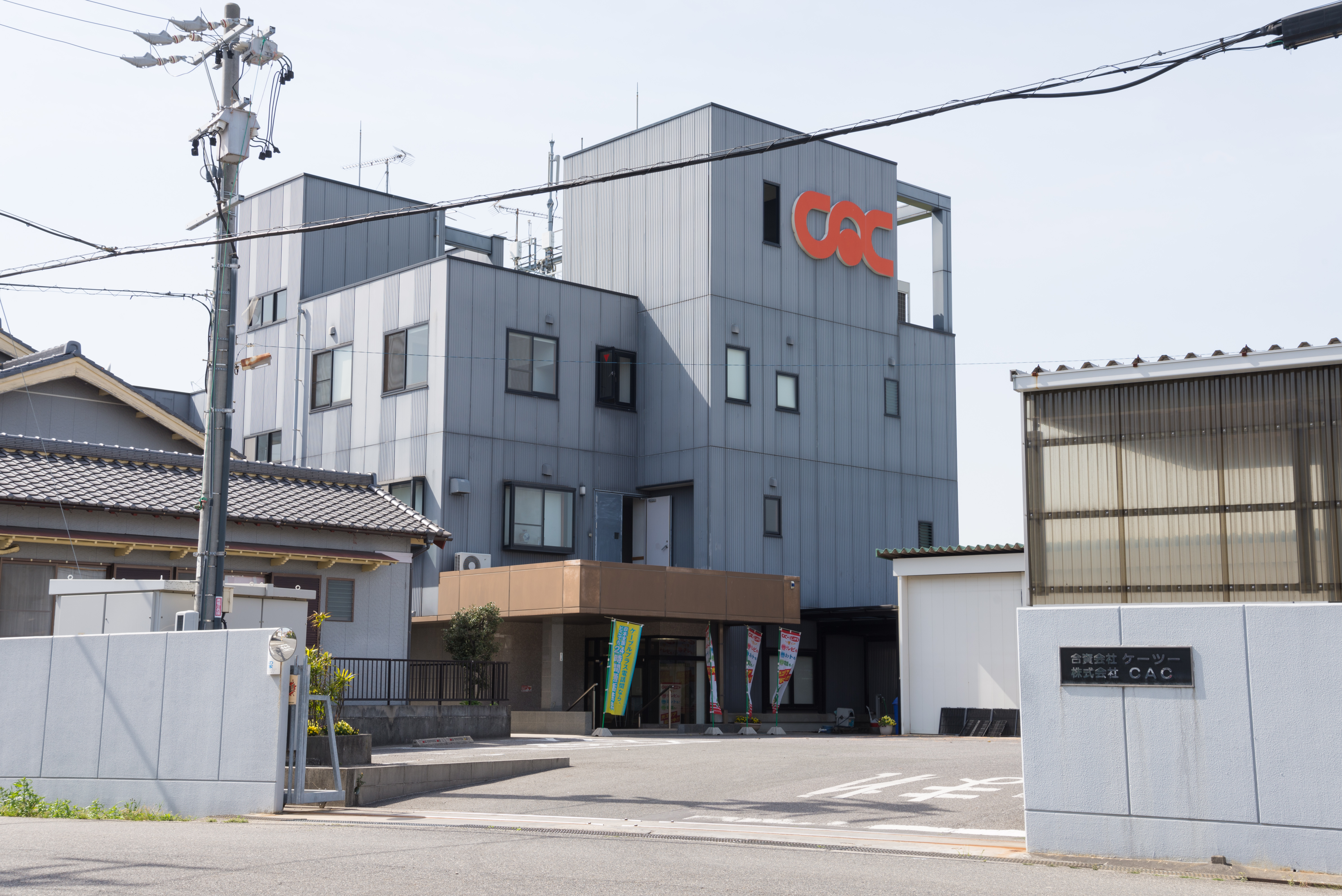 株式会社CACの本社ビル